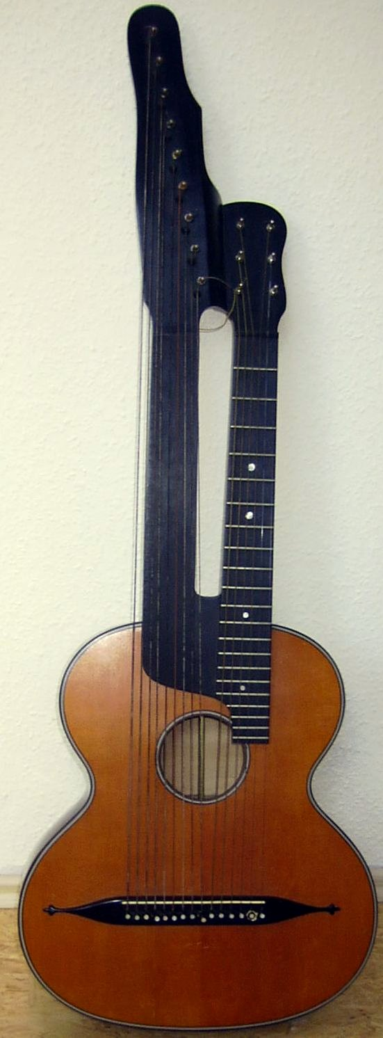 Doppelhals-Schrammelgitarre (Kontragitarre)